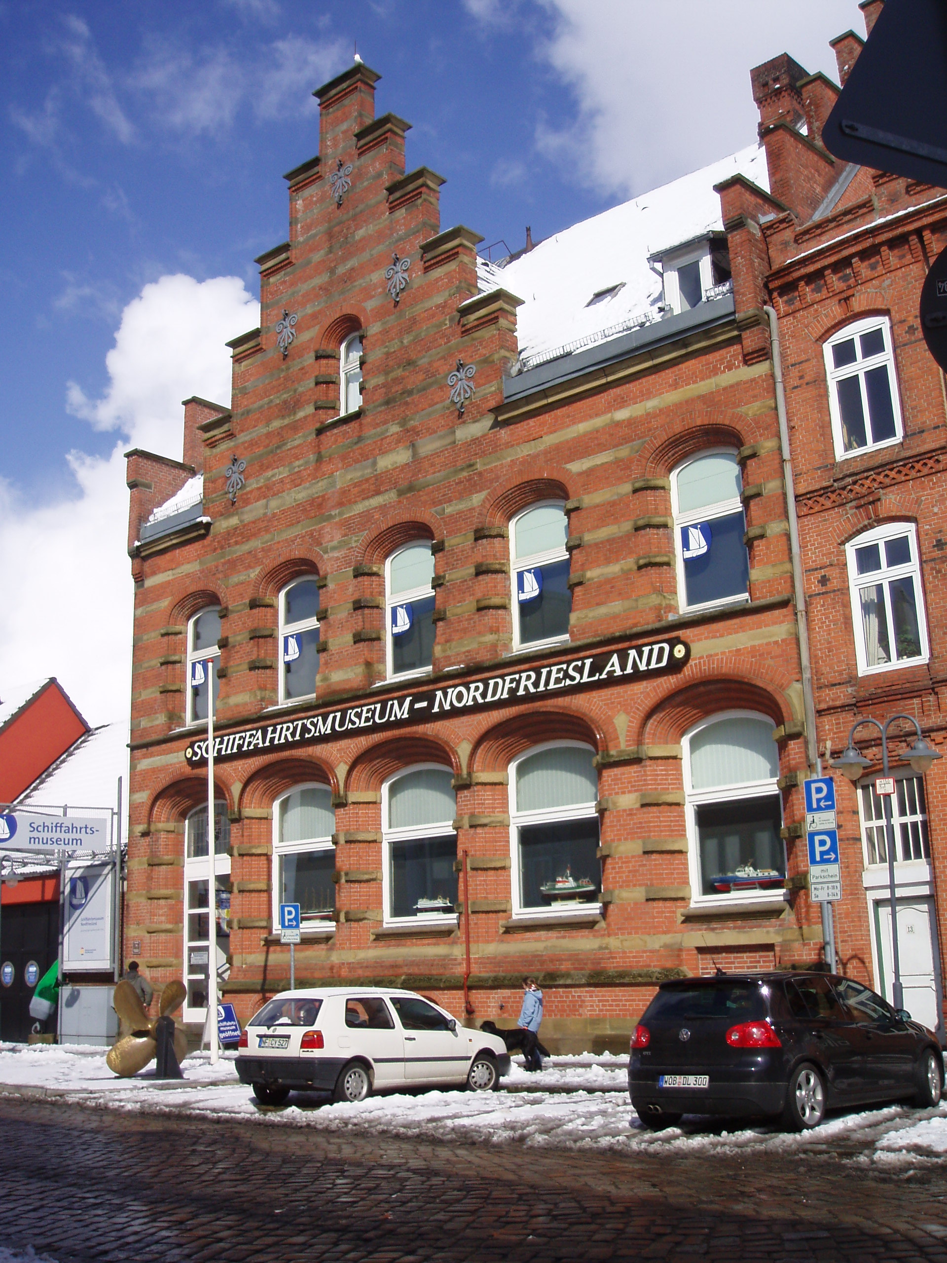 Schiffahrtsmuseum Nordfriesland in Husum